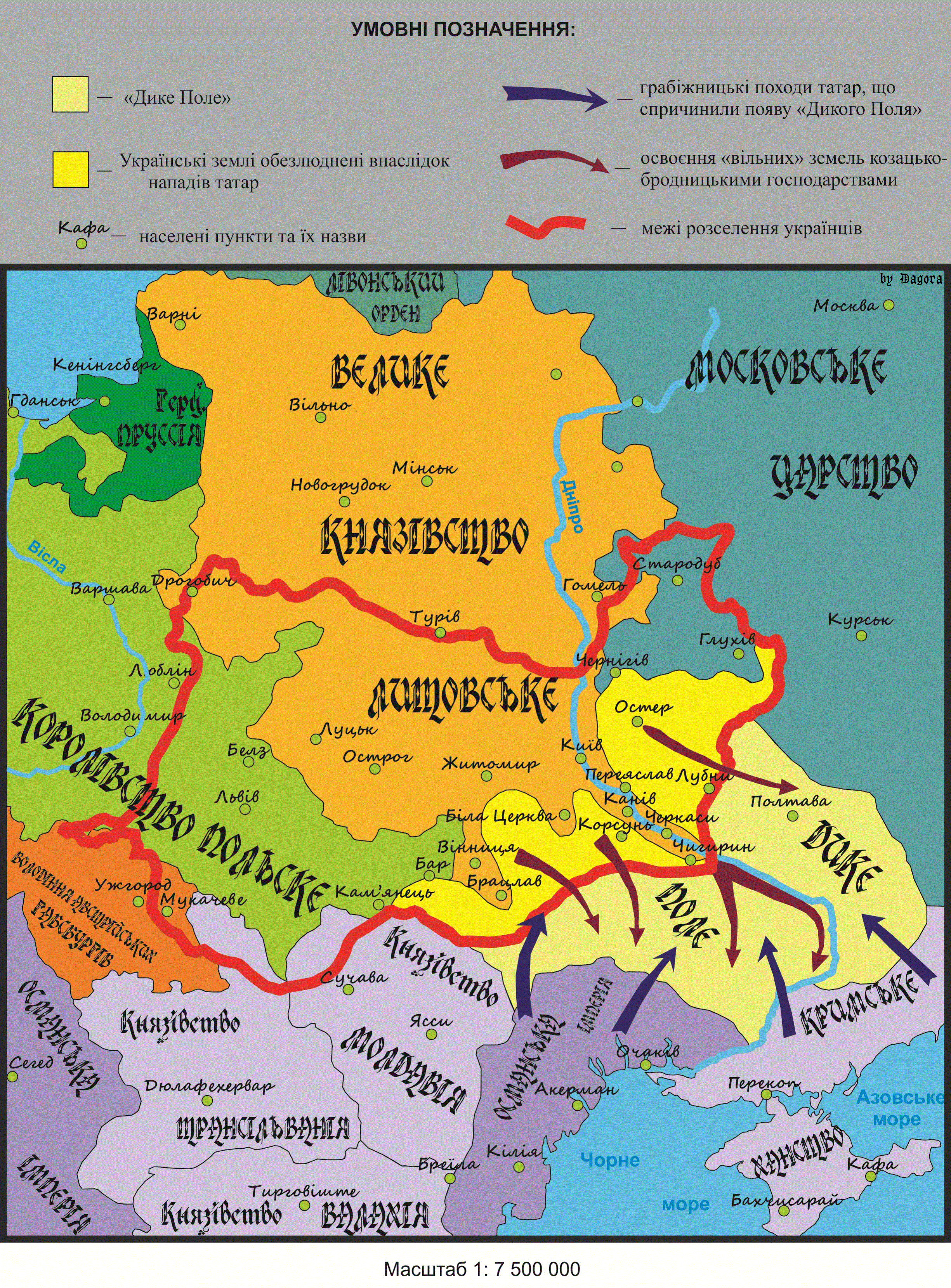 Українські землі в XV столітті